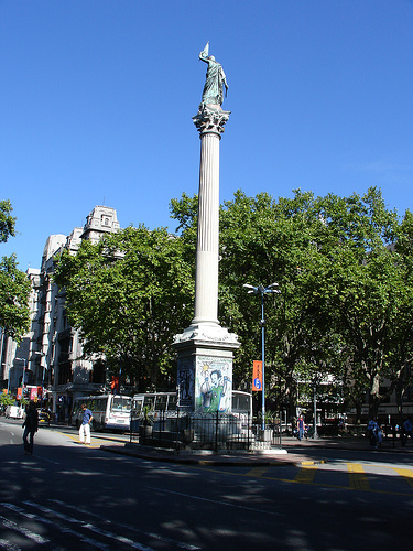 Estatua de la Paz en Plaza Cagancha de Montevideo.